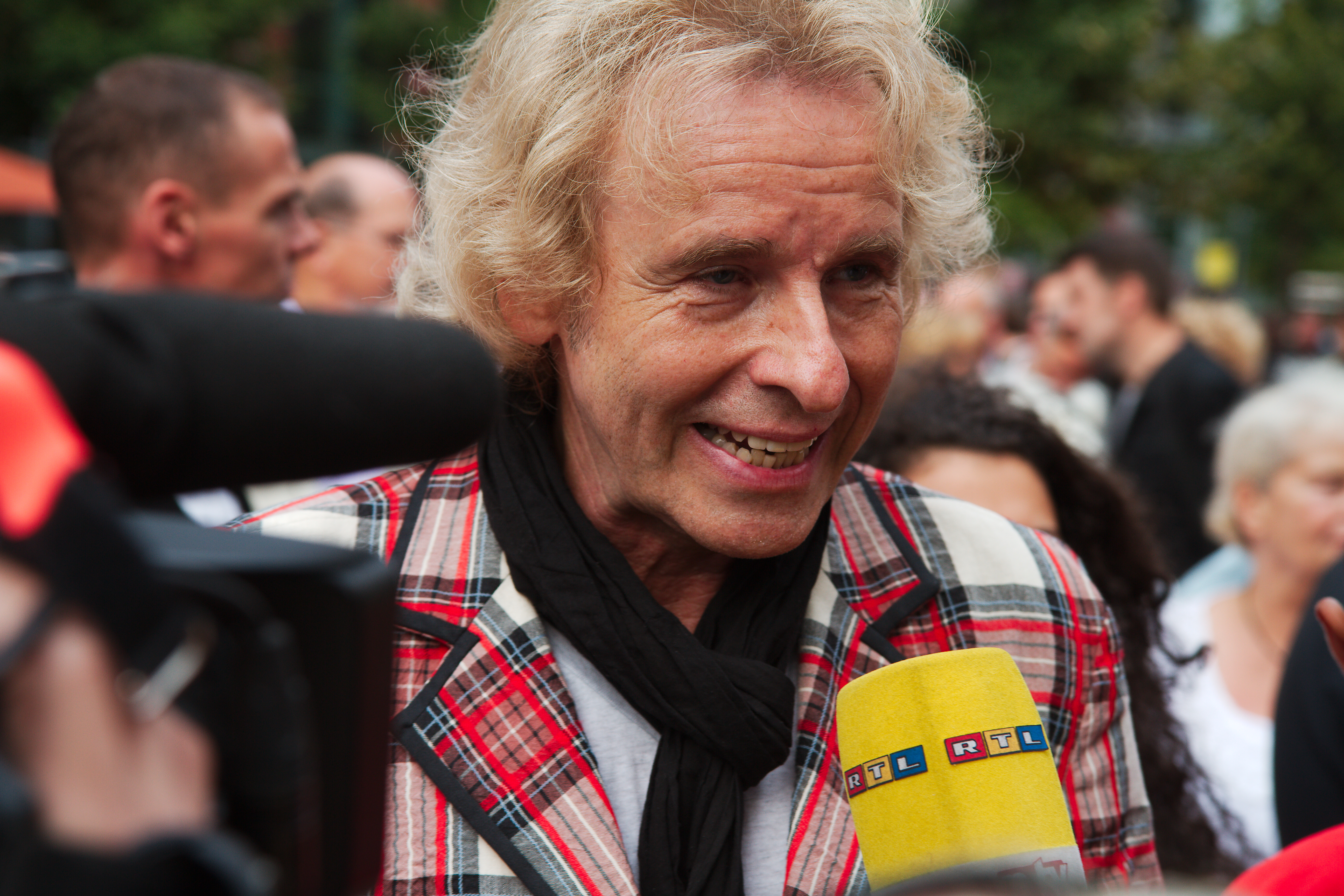 Thomas Gottschalk gibt ein Interview für RTL